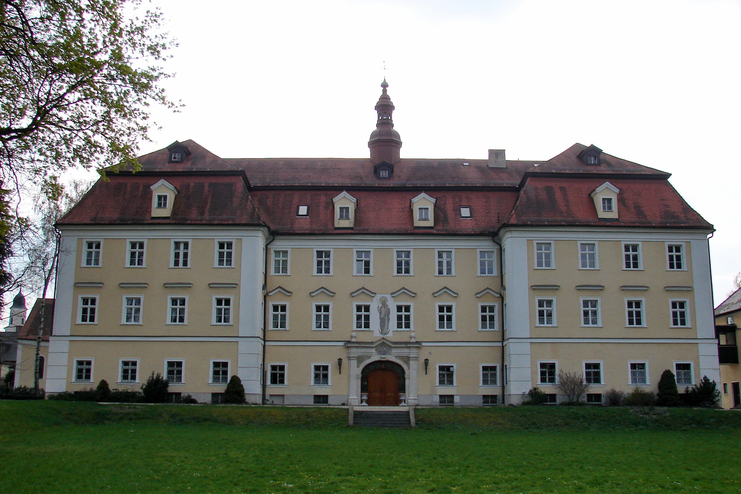 Schloss Zaitzkofen im Ortsteil Zaitzkofen im Markt Schierling